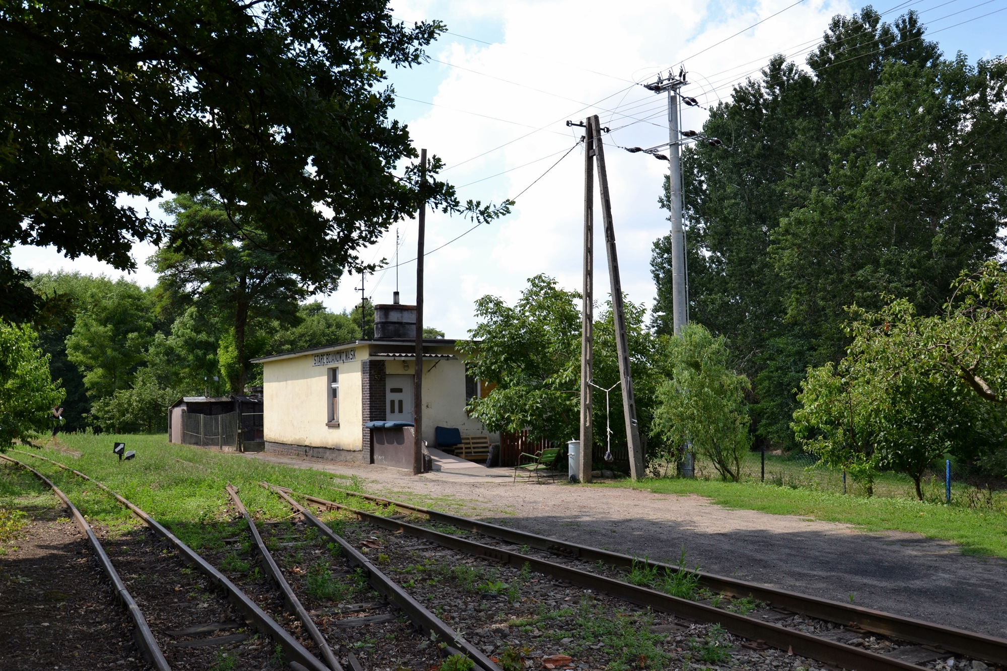 Budynek na stacji Stare Bojanowo Wąsk. (Śmigielska Kolej Dojazdowa)